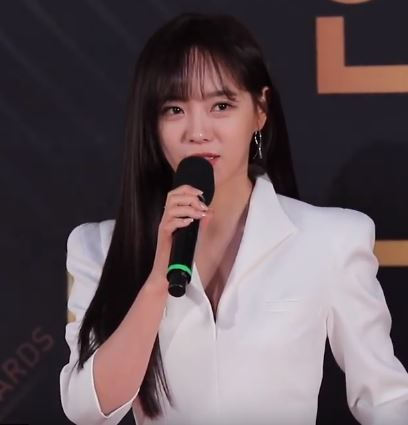 12월 31일 오후 서울시 영등포구 여의도 KBS 신관 웨딩홀에서 '2019 KBS 연기대상' 레드카펫 행사가 열려 여배우 김세정, 신도현, 윤진이, 이영은, 정유민, 하재숙이 참석해 포토타임을 갖고 있다.